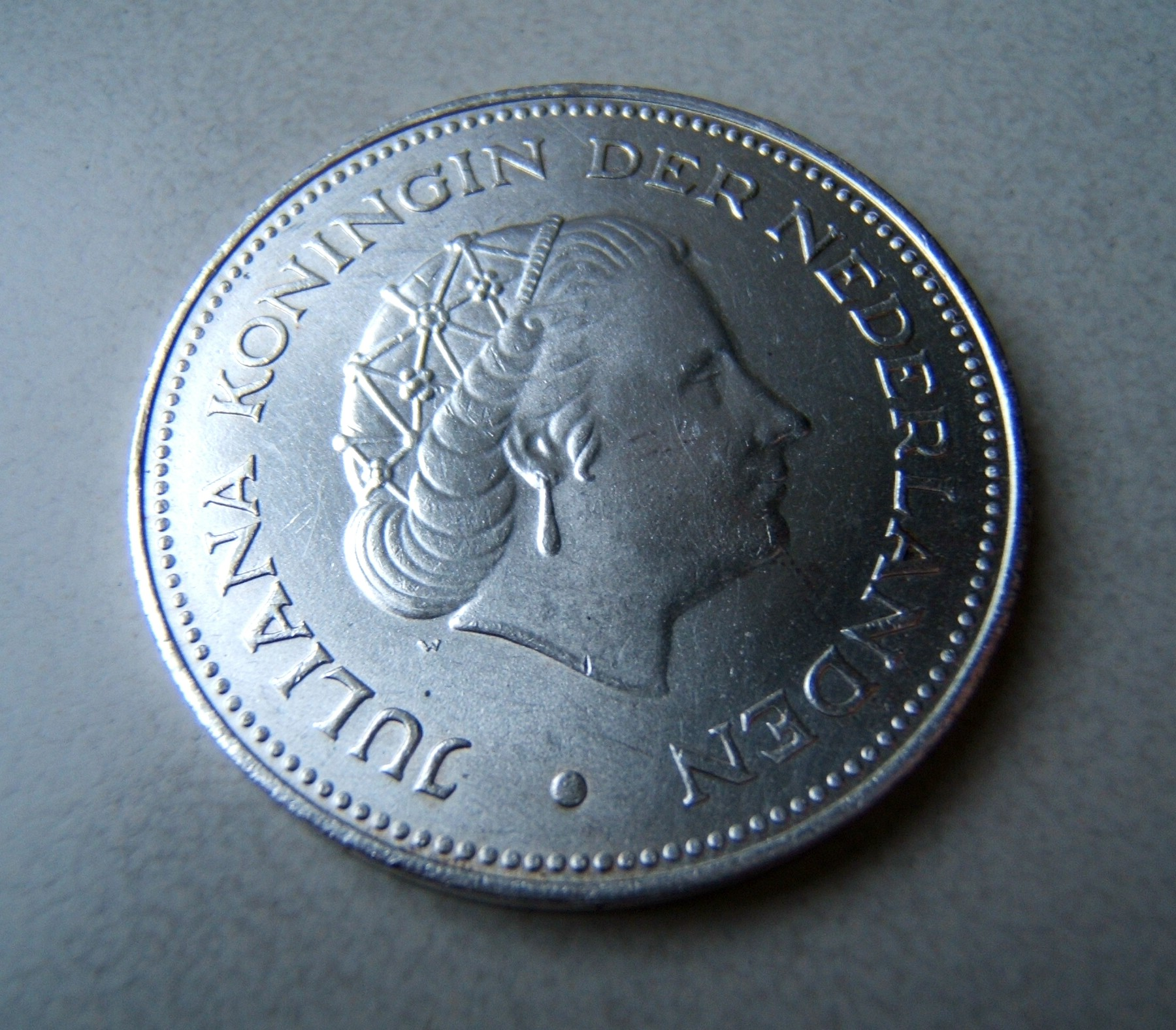 Nederland herrijst 10 gulden, 1970, kopzijde